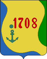 Герб города Калач-на-Дону (Волгоградская область)